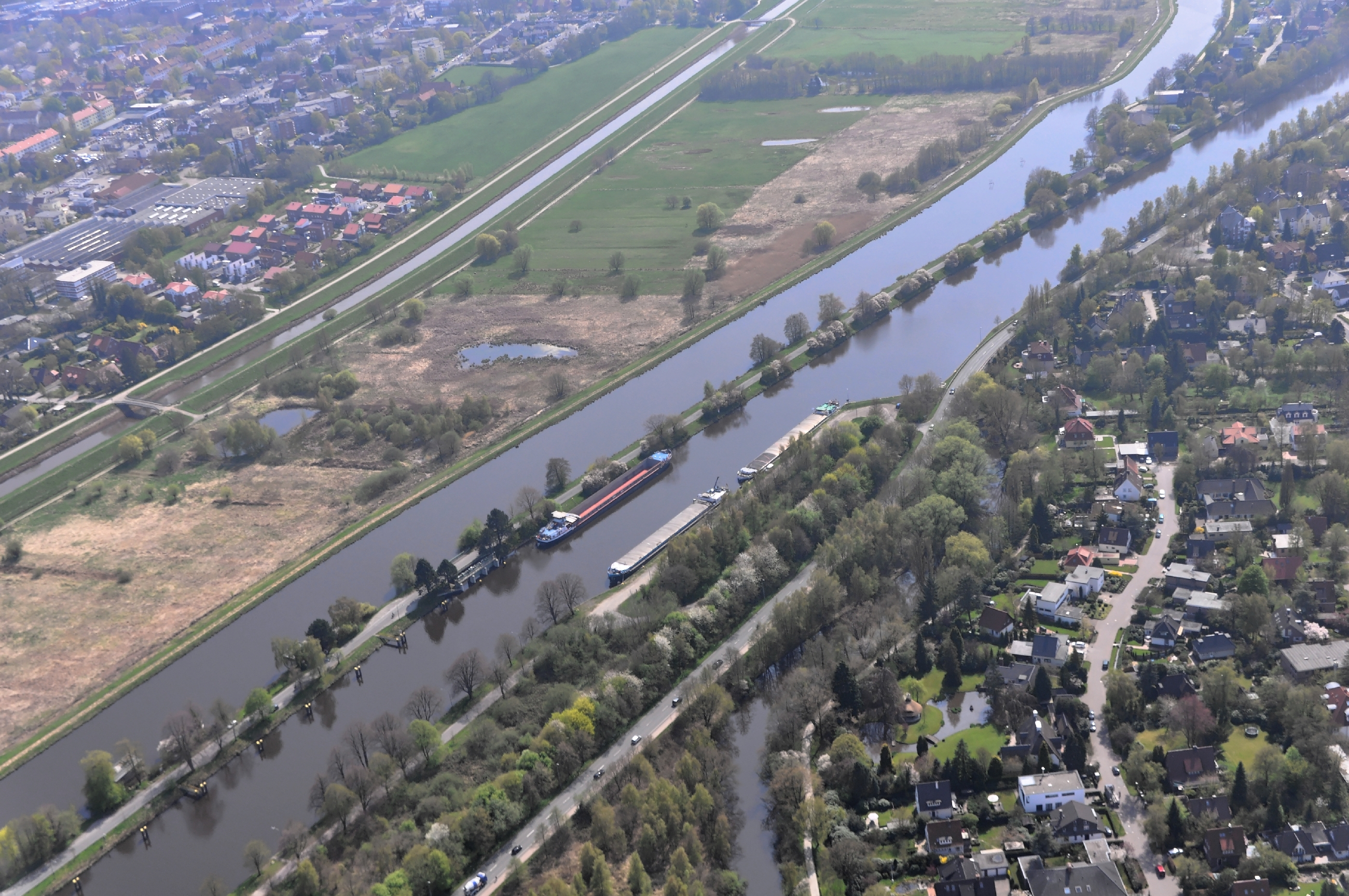 Luftbilder von der Nordseeküste 2013-05